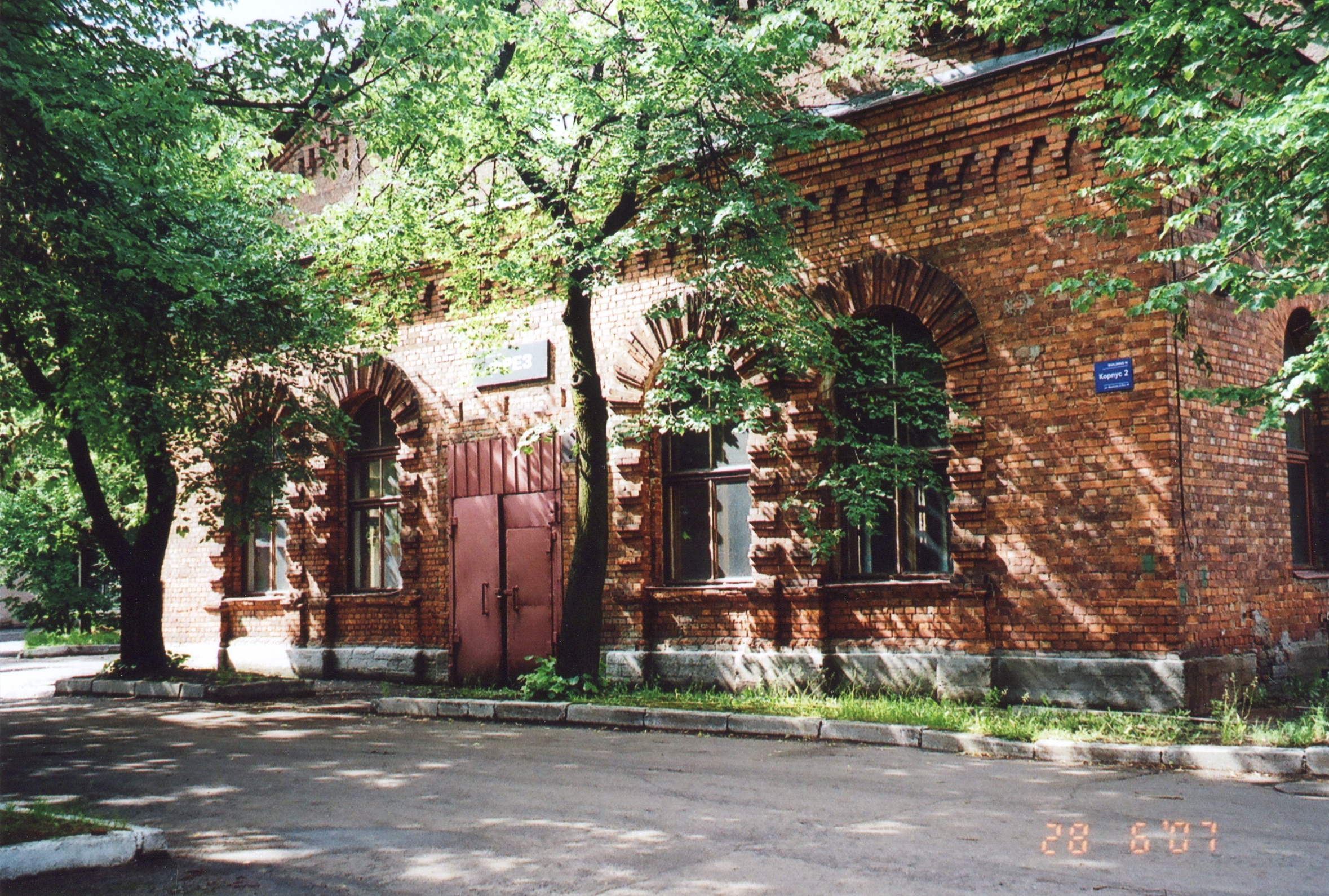 цеха Сестрорецкого инструментального завода